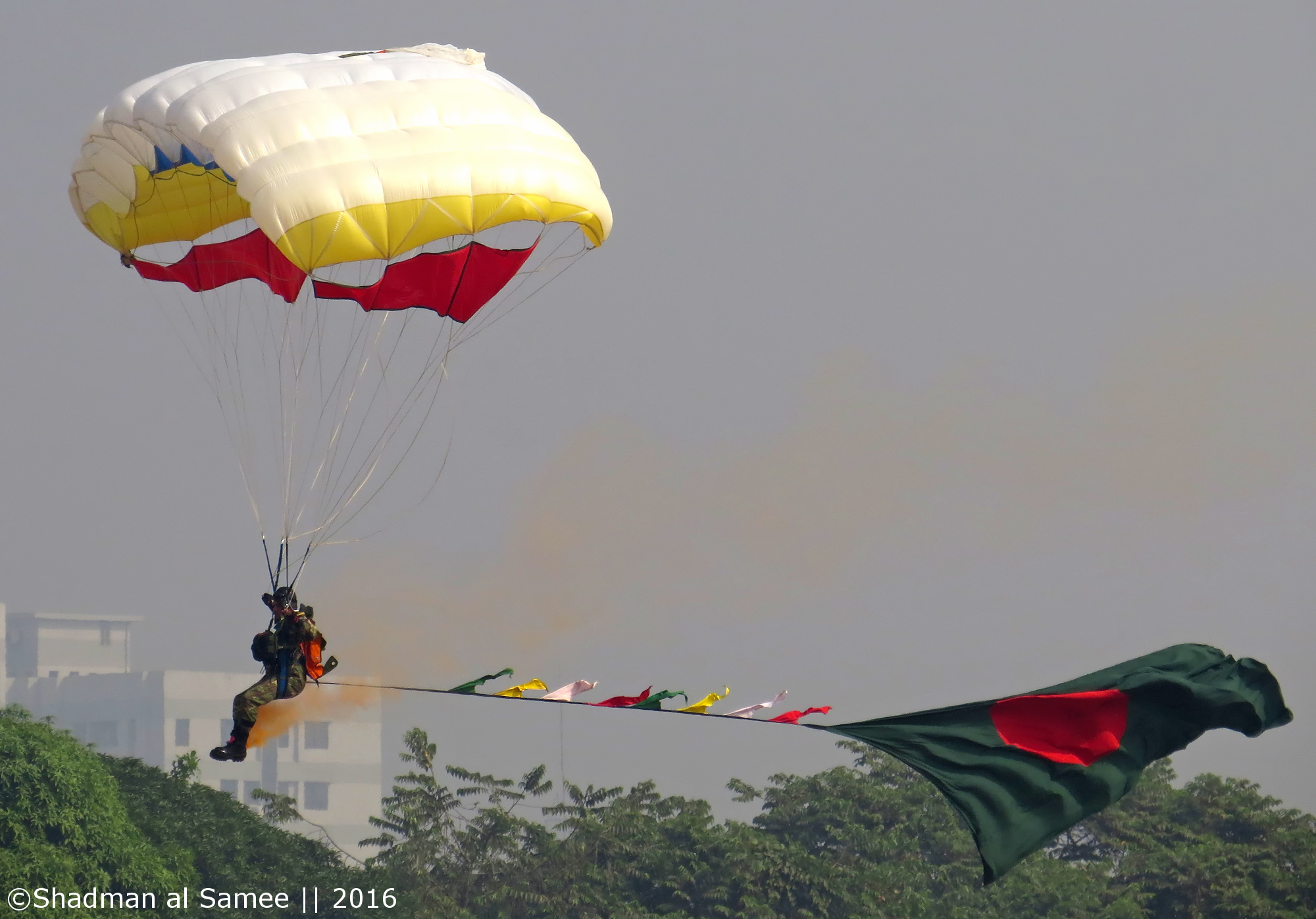 VGTJ 2016.